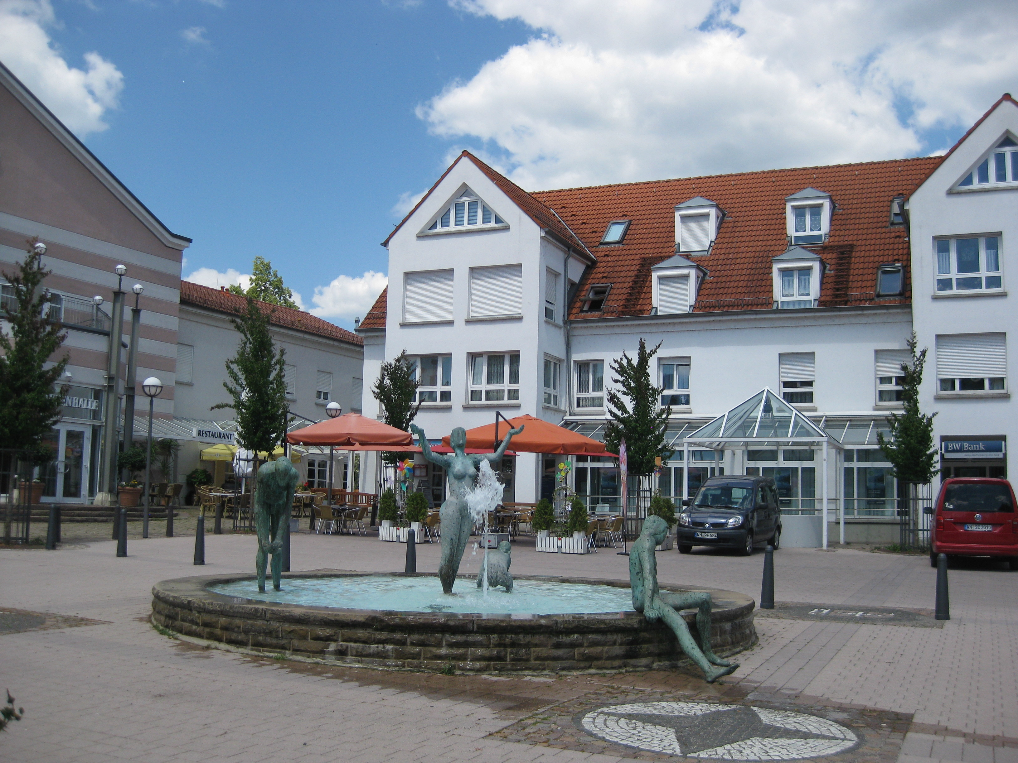 Plüderhausen im Jahr 2020